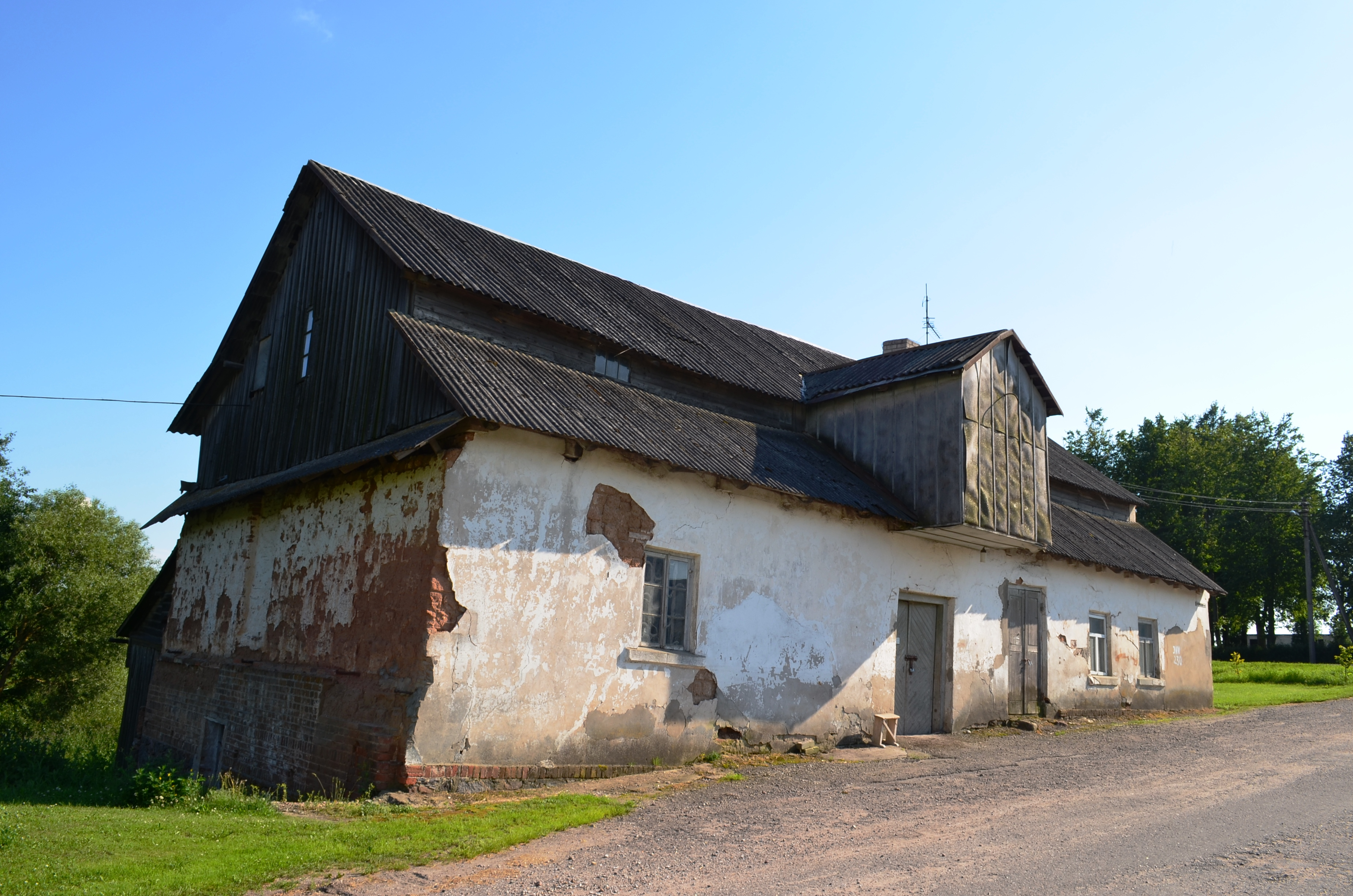 Dotnuvos vandens malūnas, Kėdainių raj.